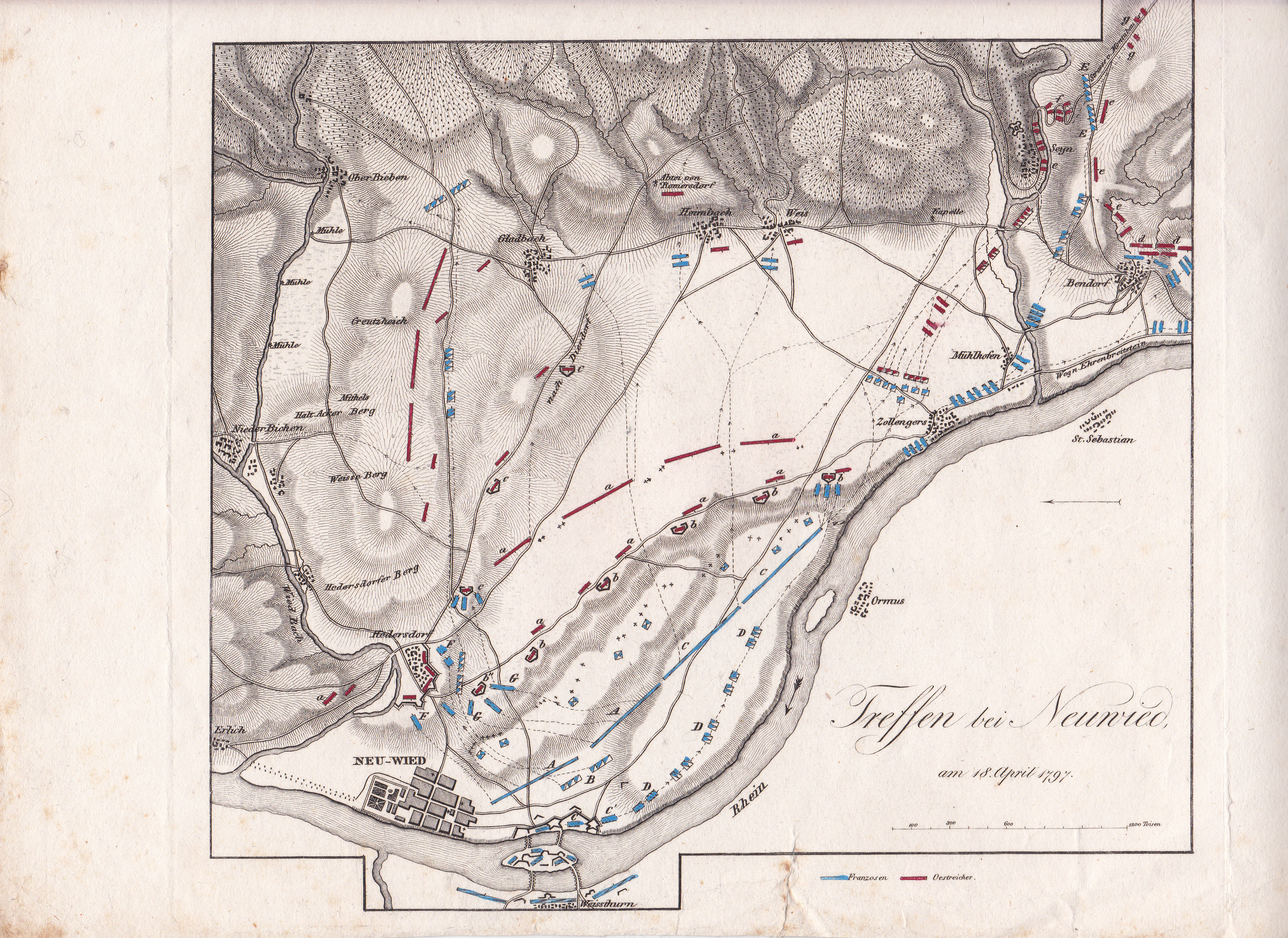 Colorierte Lithographie aus Geschichtsatlas 1850 " Die Schlacht von Neuwied "18. April 1797